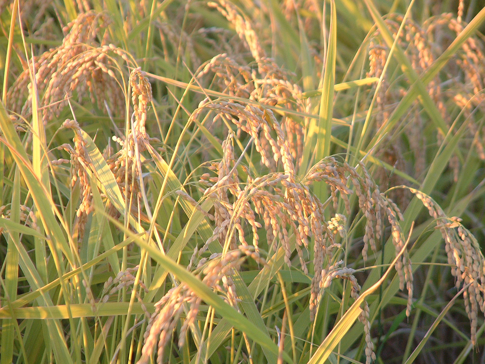 収穫前のコシヒカリ。種籾用に栽培しているもの。投稿者による撮影。撮影日2006年9月23日。